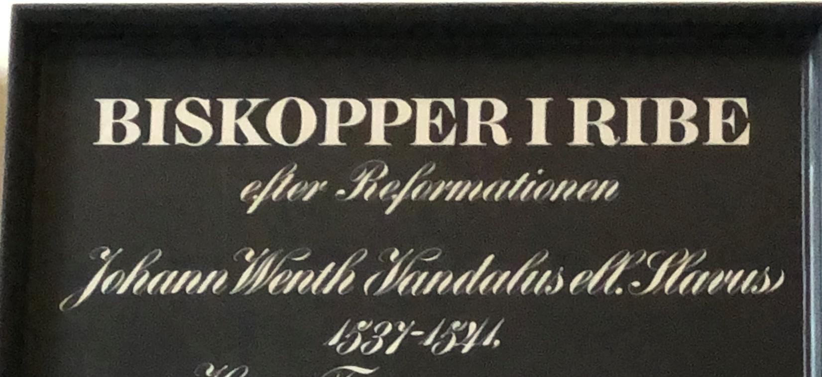 Bisperække-tavle i Ribe Domkirke. Ribes første biskop efter Reformationen i Danmark Johann Wenth